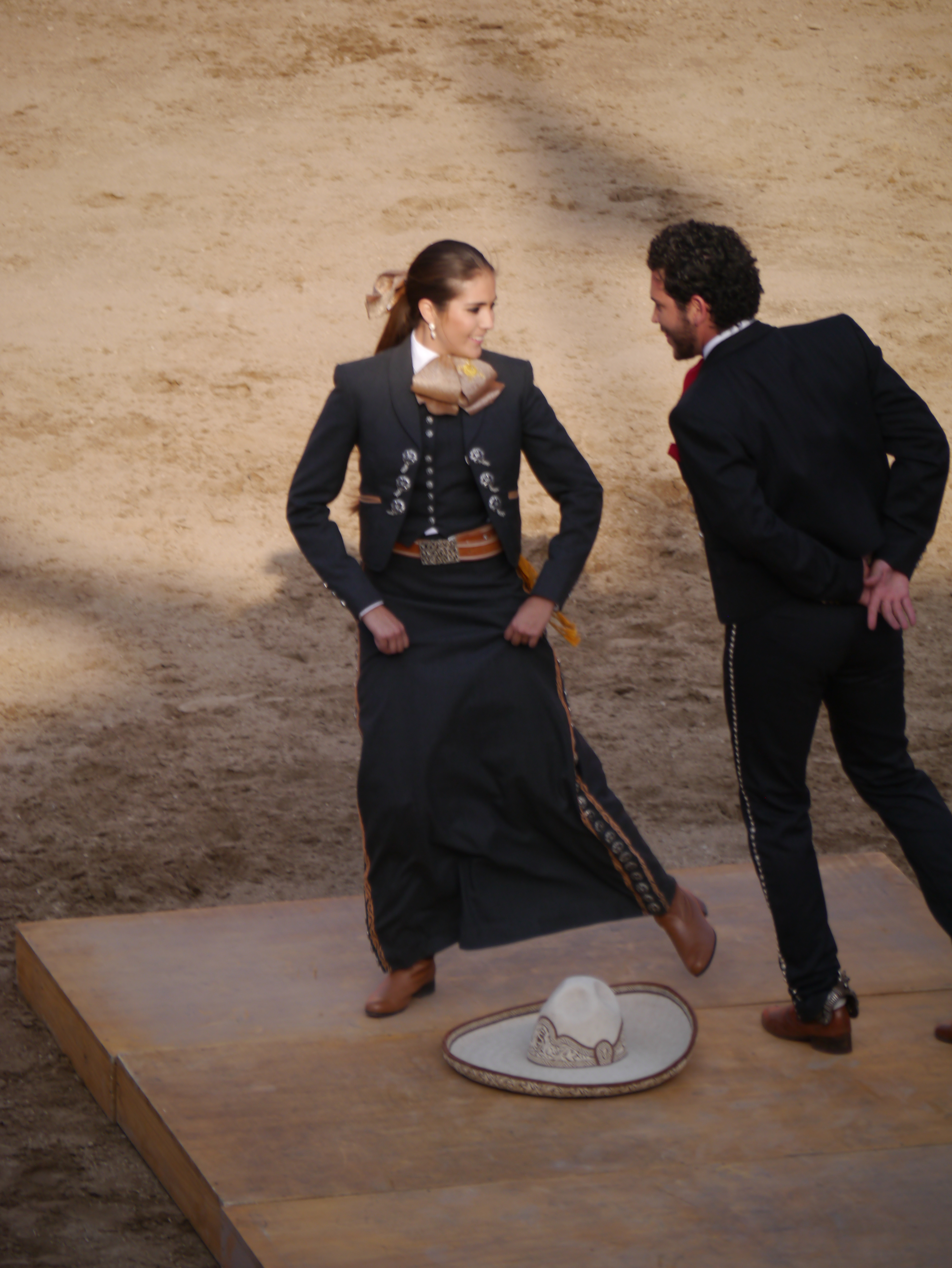 jarabe...